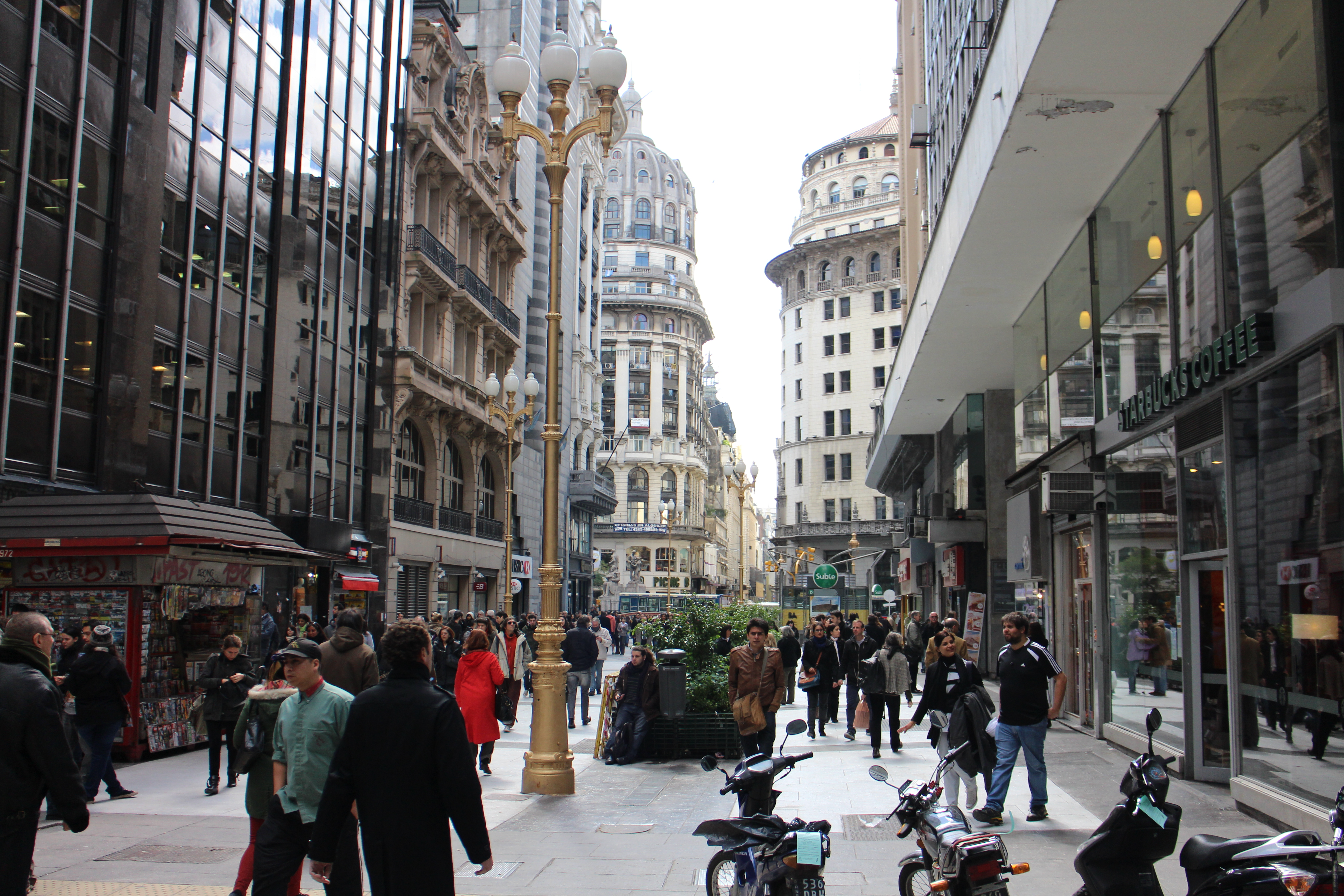 Calle Florida, Microcentro, Ciudad Autónoma de Buenos Aires.